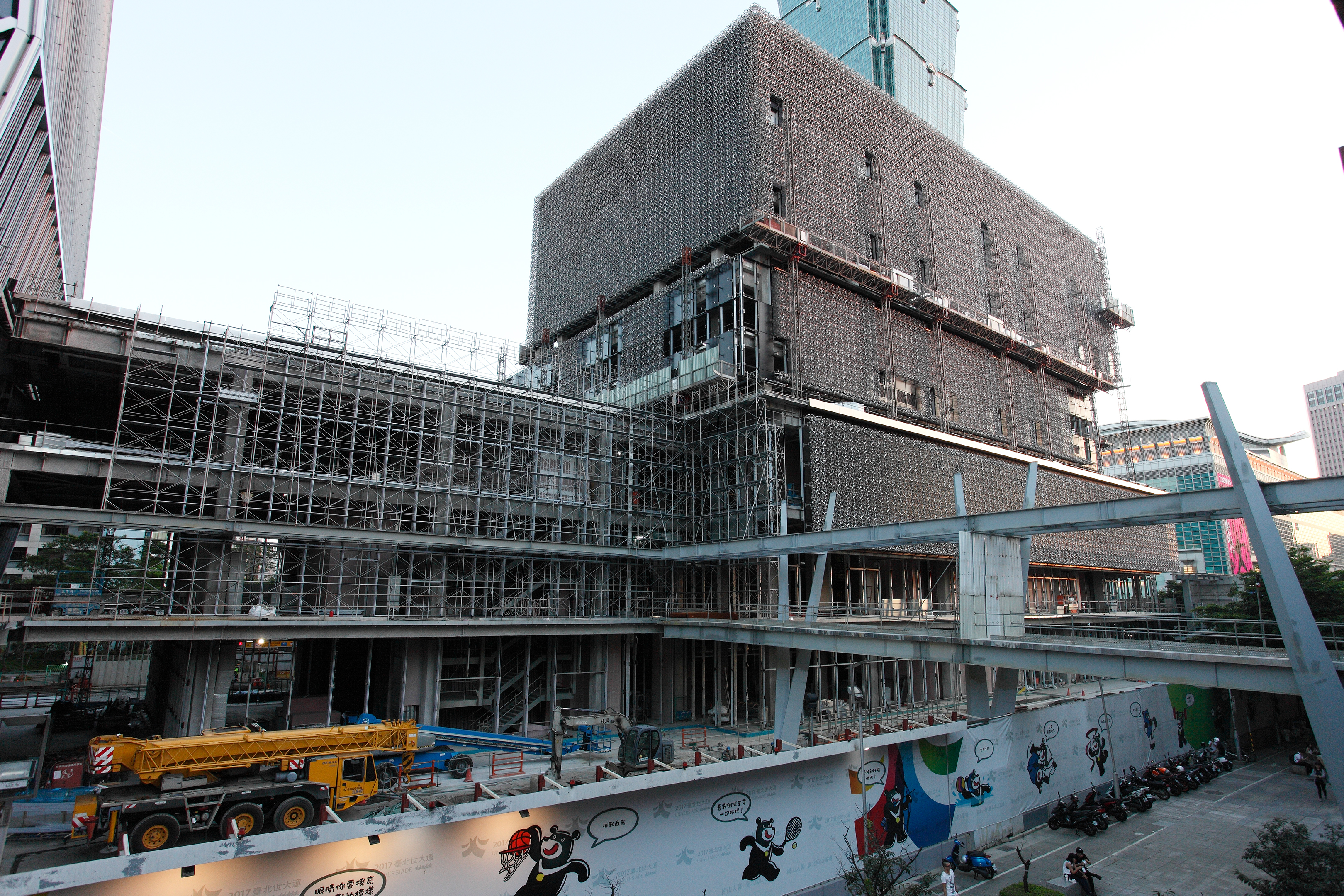 臺北南山廣場建築工地。